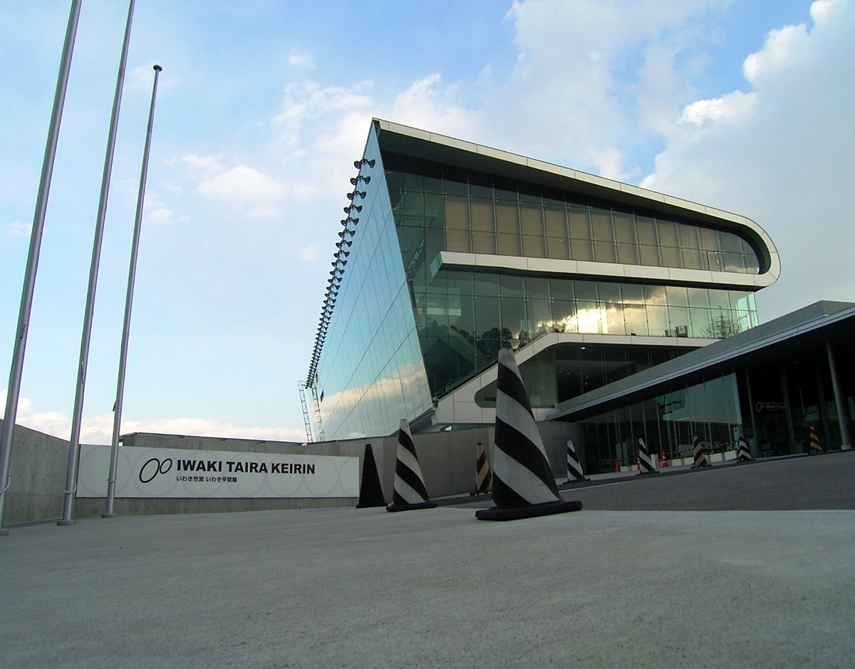 IwakiCity iwaki Tairakeirin いわき市 いわき平競輪場の外観